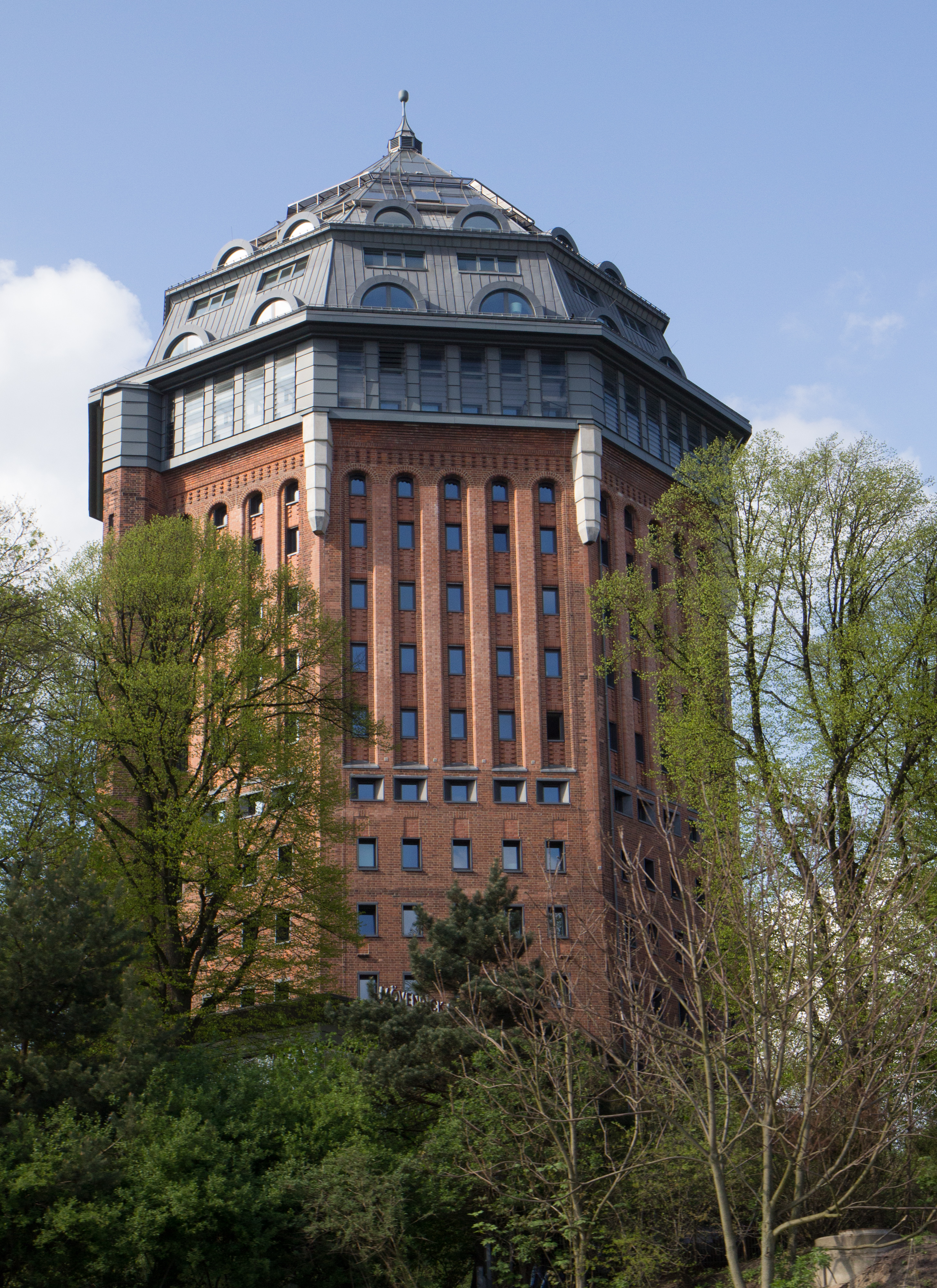 Der Schanzenturm ist der ehemals größte Wasserturm Europas auf einem Hügel (28 m ü. NN) des Hamburger Sternschanzenparks. Umbau zum Mövenpick Hotel Hamburg.